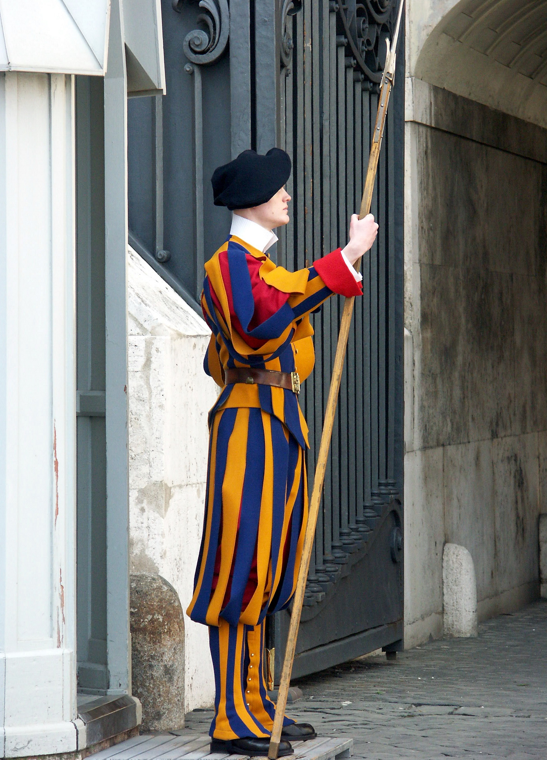 Rom, Vatikan, Soldat der Schweizer Garde